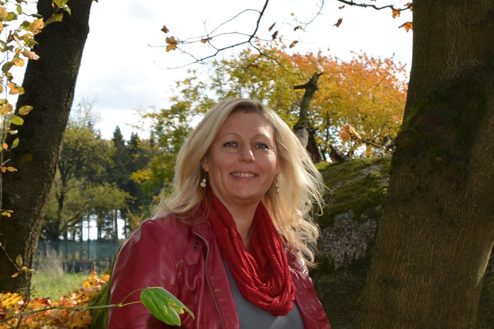 Eunike Grahofer